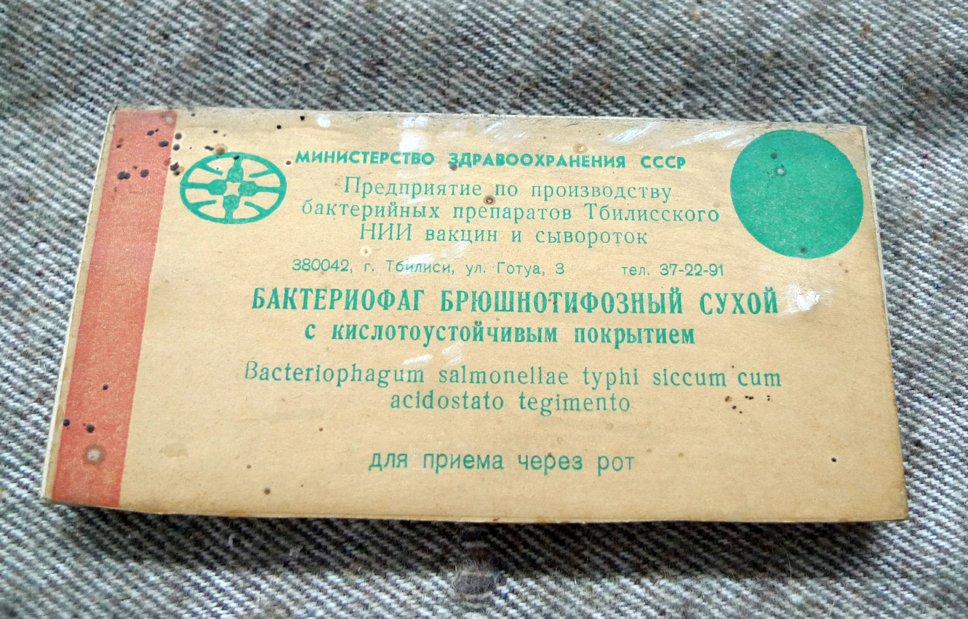 Label eines Phagenpräparats gegen Salmonellen-Infektion des Eliava-Instituts, sowjetische Ära